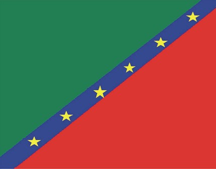 Bandera del Municipio Veroes de Venezuela